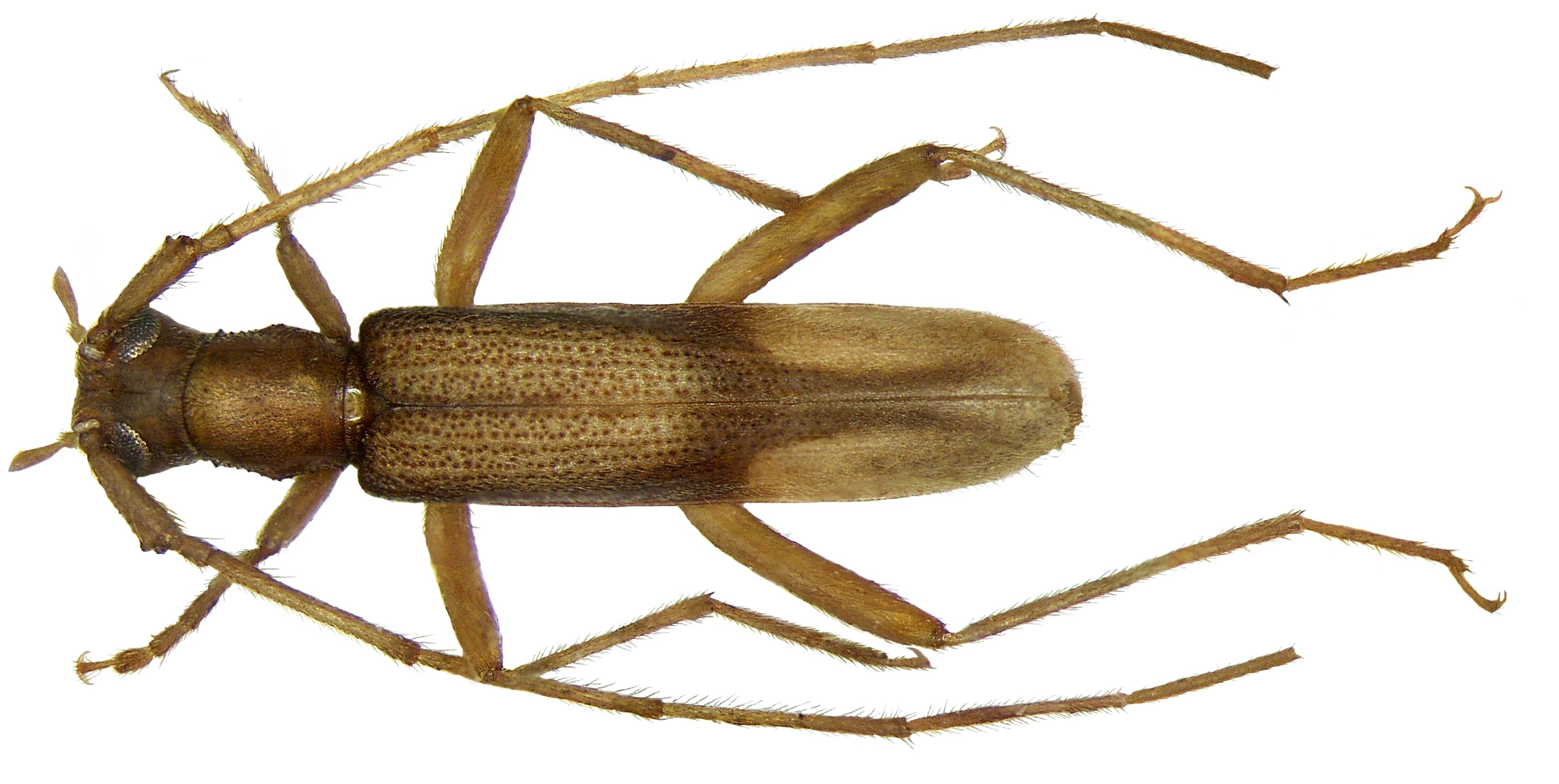 Familie: Cerambycidae Grösse: 6 mm Fundort: Indonesien, Irian Jaya, Japen leg. det. A.Weigel, 1999 Foto: U.Schmidt, 2007